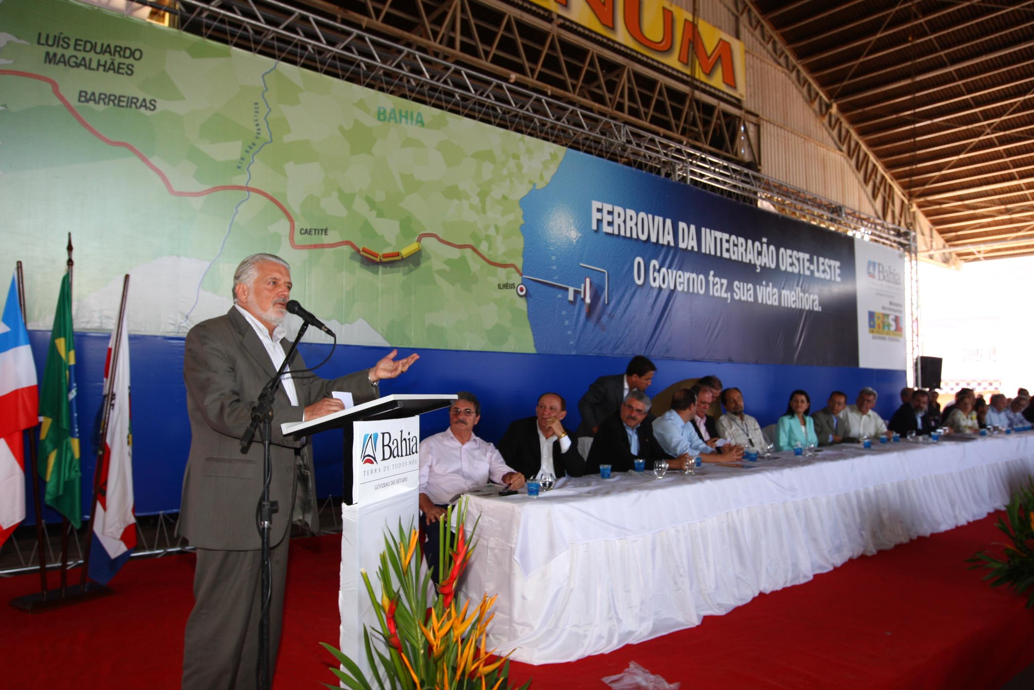 Ferrovia Leste-Oeste: A previsão é que a conclusão do primeiro trecho, Ilhéus (Sul) a Caetité (Sudoeste baiano), aconteça em julho de 2011; do segundo, de Caetité a Correntina/Barreiras (Oeste baiano), em julho de 2012; e do terceiro, de Correntina/Barreiras a Figueirópolis (TO), em dezembro de 2012.